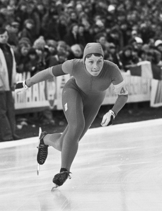 Wereldkampioenschap schaatssprint in Alkmaar; Haitske Pijlman in actie.